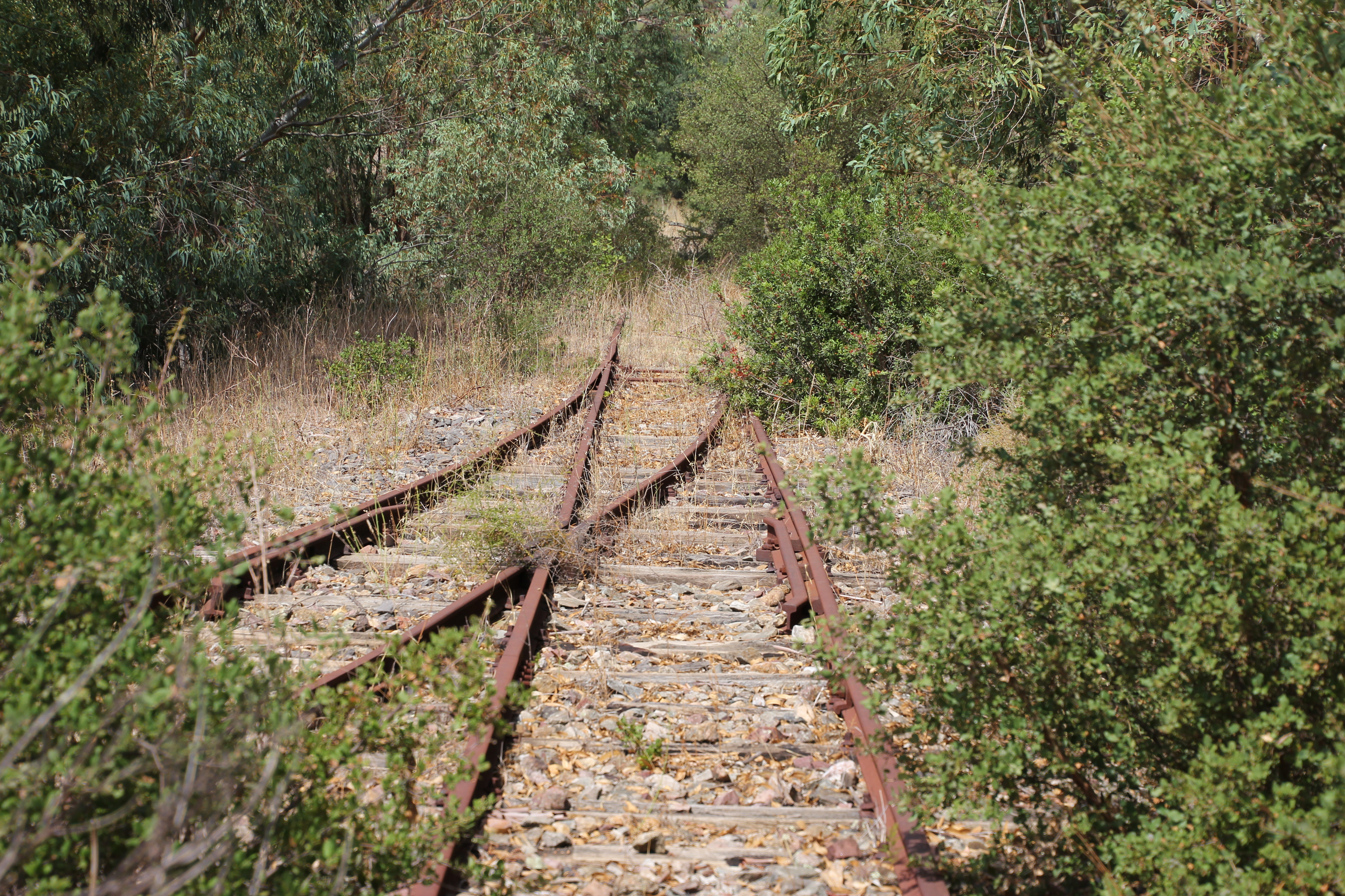 Illorai - Stazione Tirso